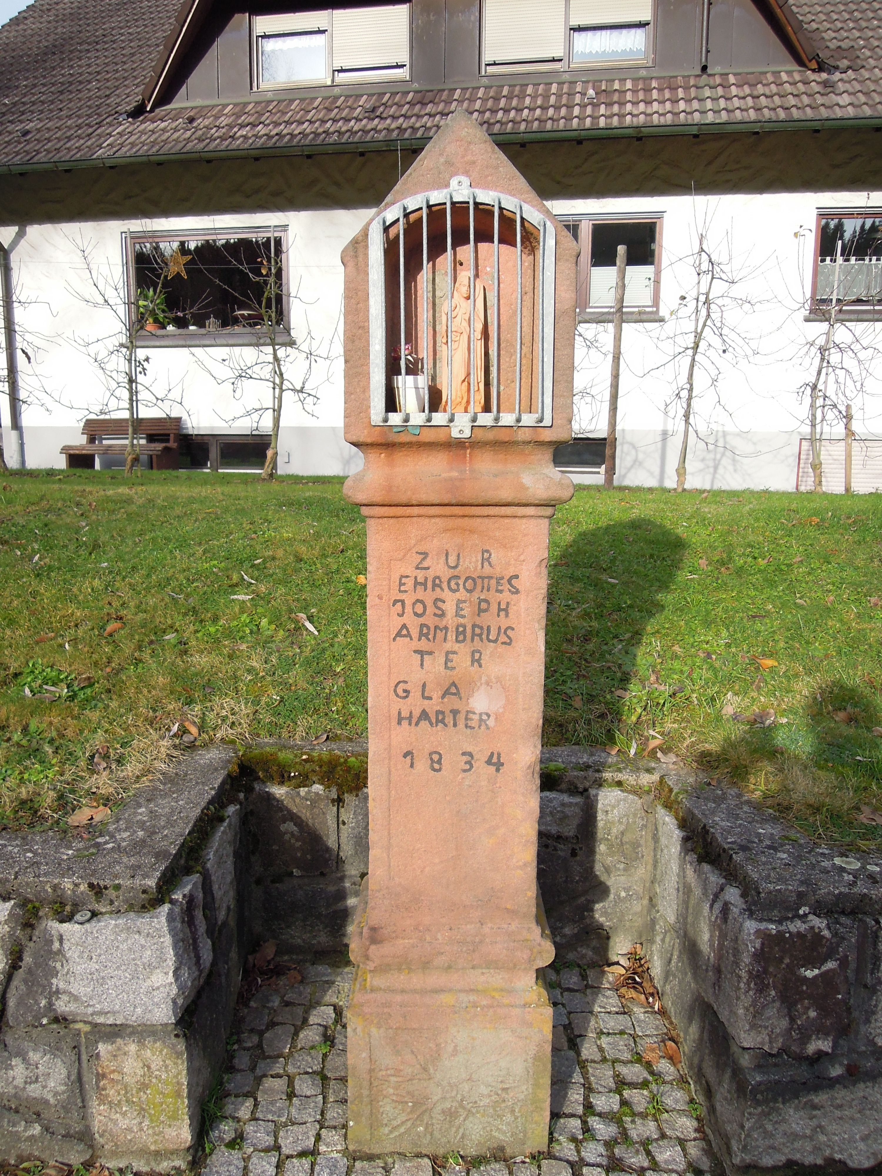 BIldstock von 1834